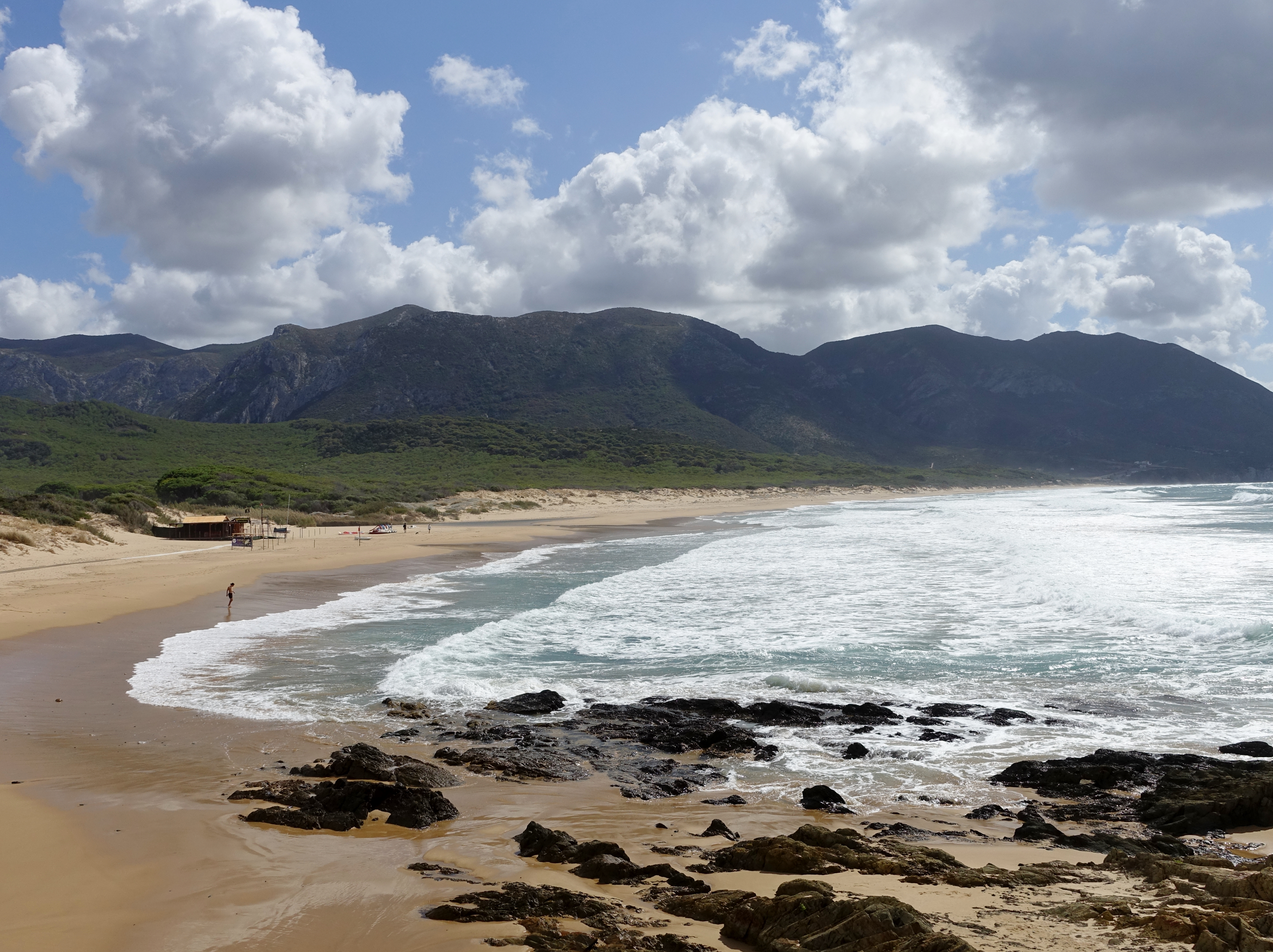 Strand Portixeddu (Spiaggia Portixeddu), Gemeinde Fluminimaggiore, Sardinien, Italien